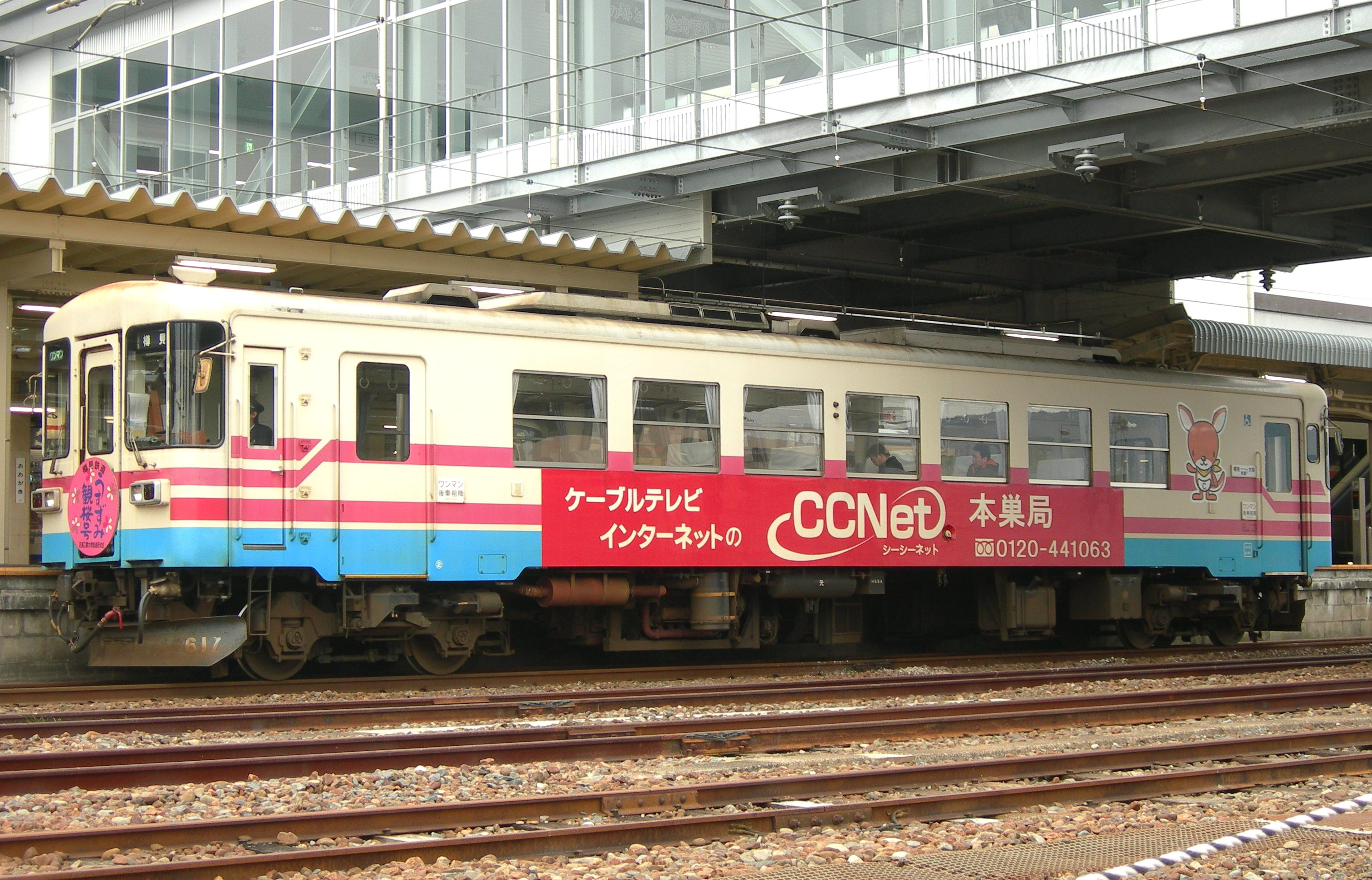 樽見鉄道ハイモ295-617(元三木鉄道ミキ300-105)